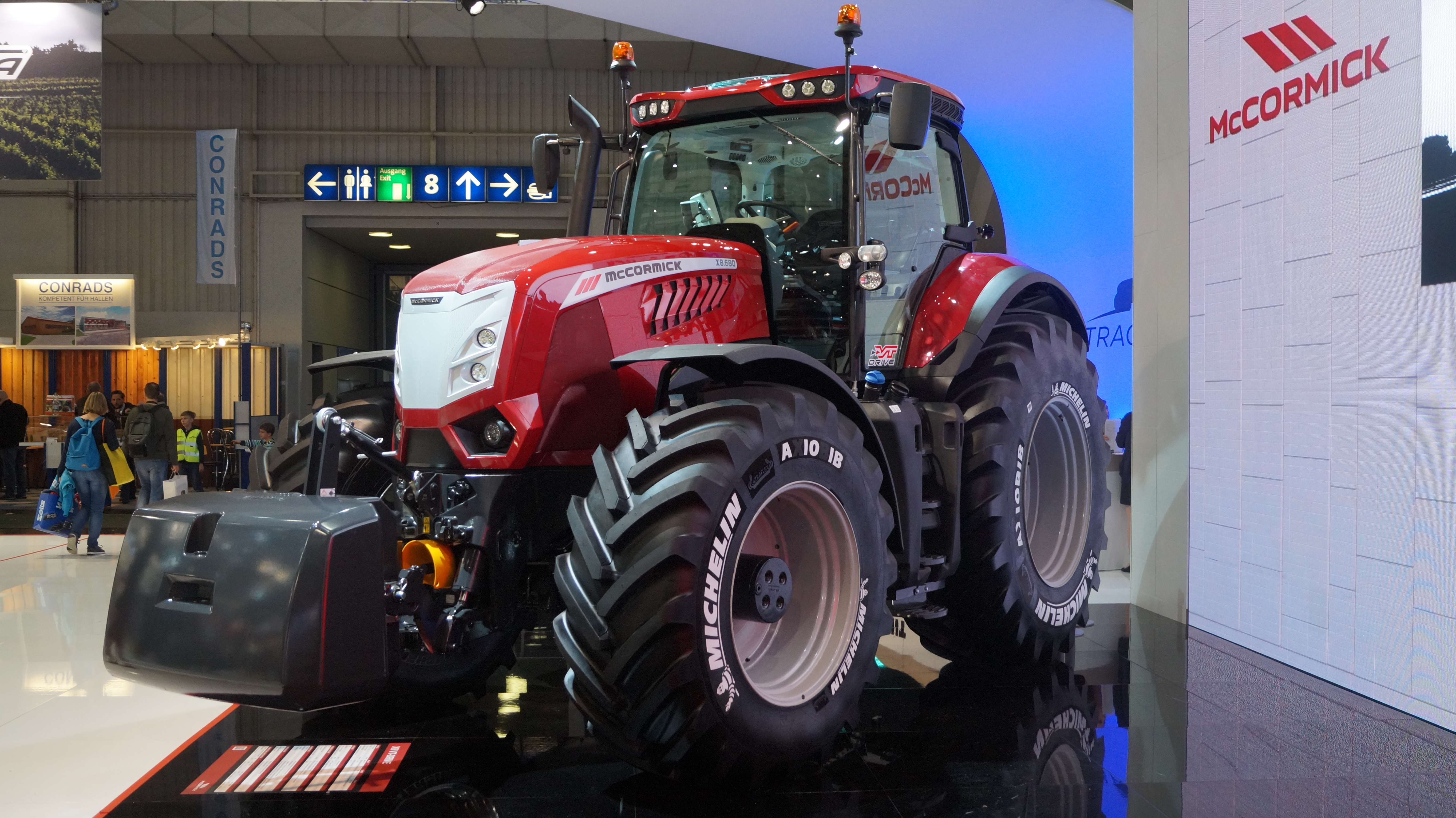 Schrägansicht der Front eines McCormick X8.680, ausgestellt auf der Agritechnica 2017.